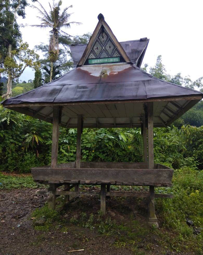 Giriten Juma Gerat diresmikan pada tanggal 1 Januari 1975 sebagai tempat sejarah tulang belulang nenek moyang Pinem Mergana.